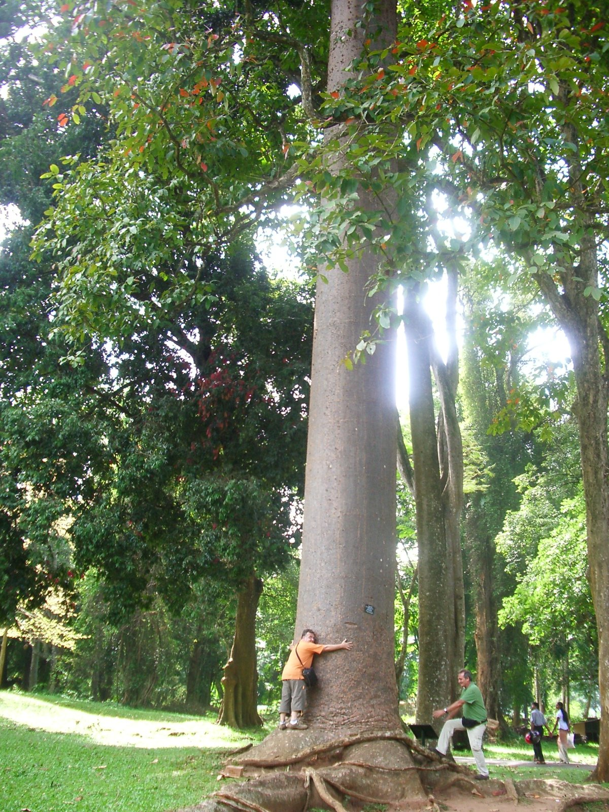 Giant tree, Jardi botanic de Sri Lanka, imatge feta per J. Olle el juliol del 2006